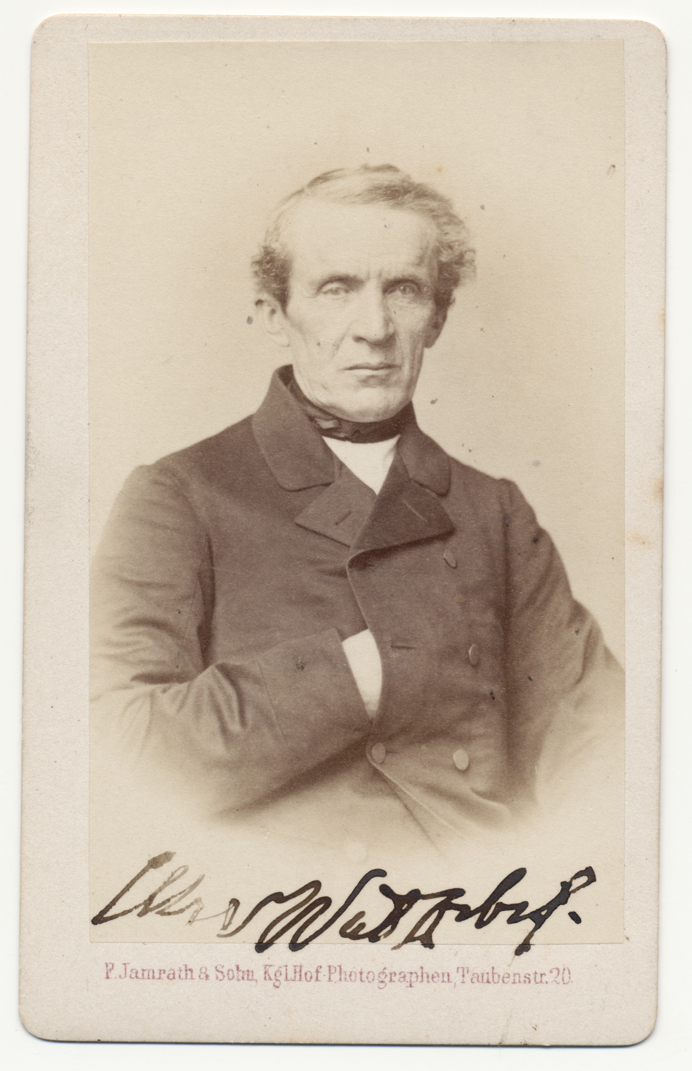 Signierte Porträtfotografie von Christian Bernhard von Watzdorf (1804-1870)